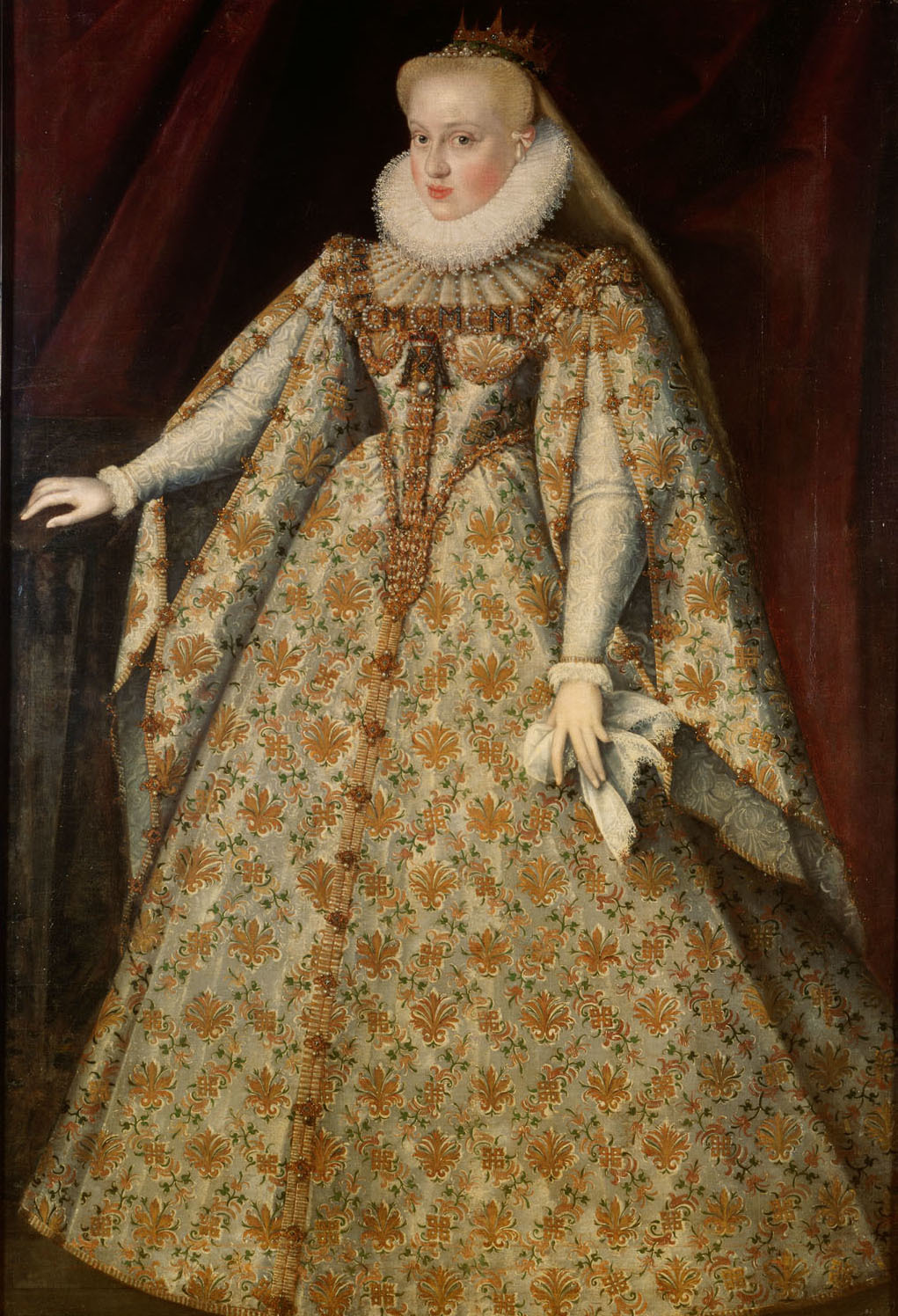 Zeitgenössiches Porträt Maria Christinas von Habsburg, Frau von Sigismund Báthory